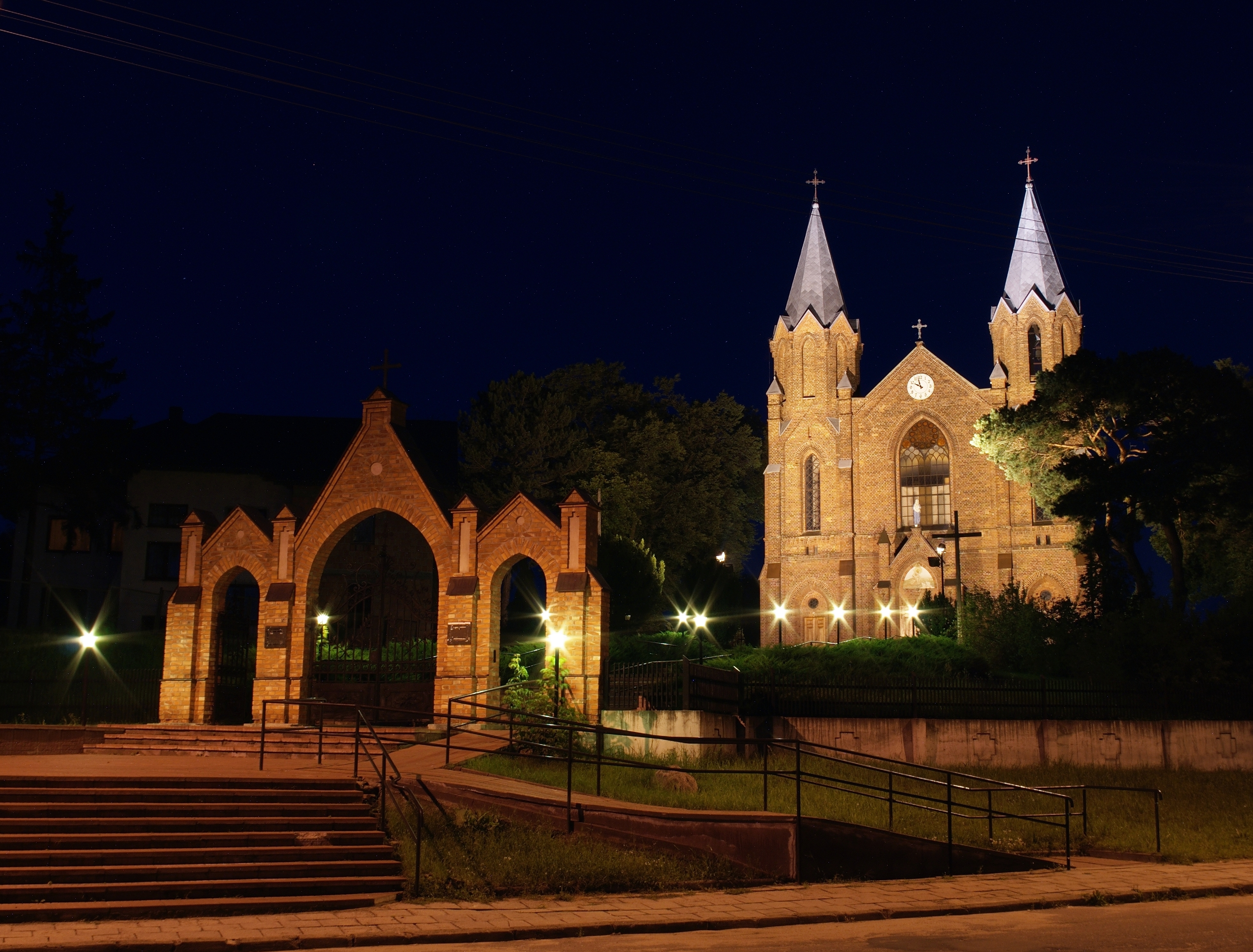 Leoncin, kościół par. p.w. św. Małgorzaty (zabytek nr rejestr. 1052/1045)